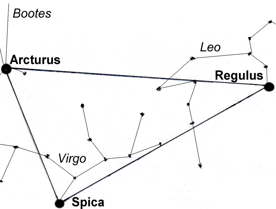 Fréijoersdräieck